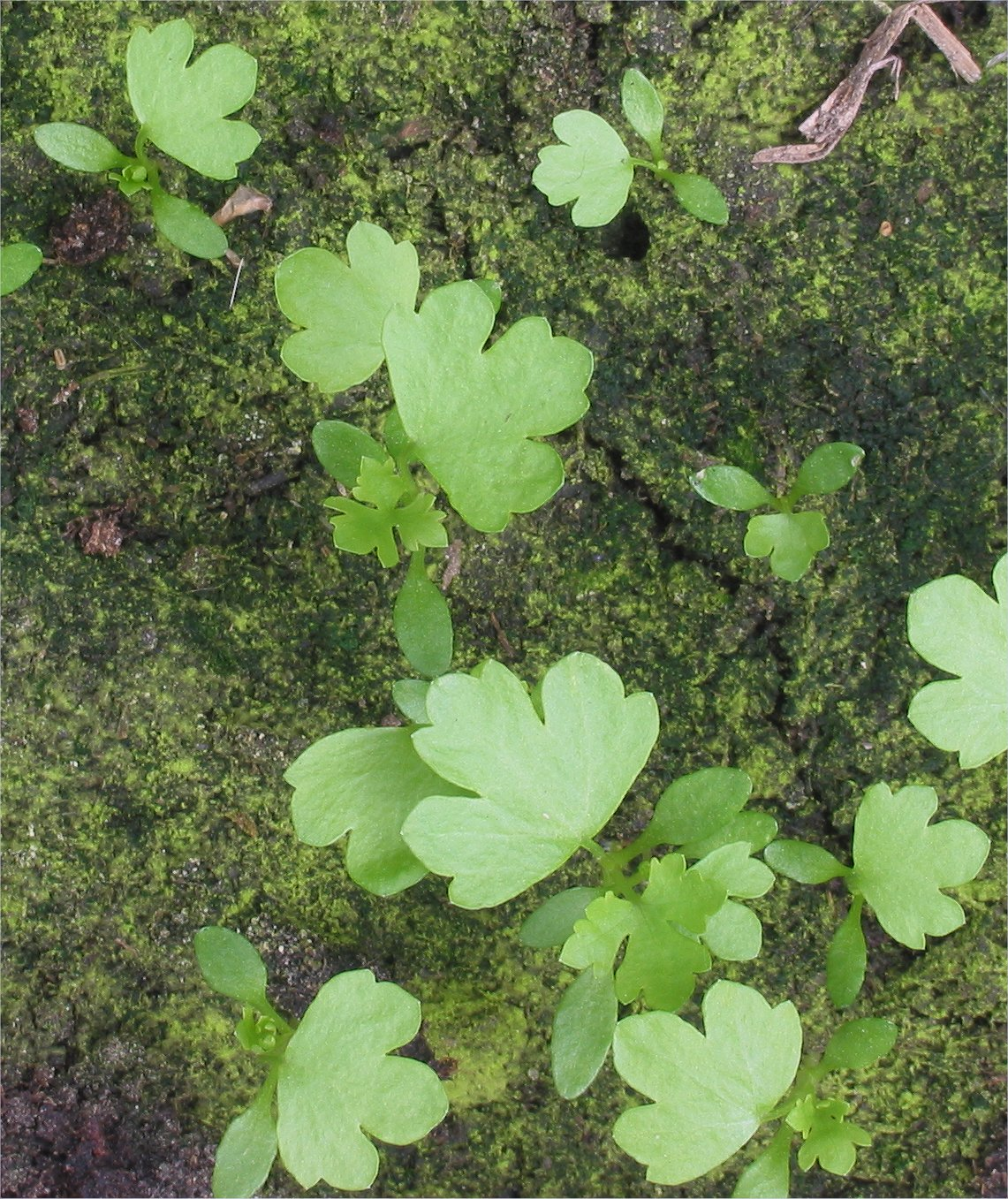 (nl: Knolselderij kiemplanten) Apium graveolens var. rapaceum seedlings